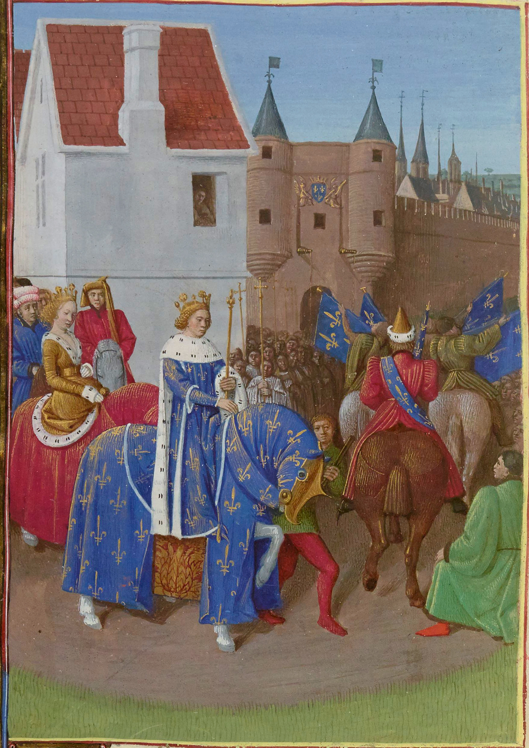 Entrée de Jean II le Bon Grandes Chroniques de France, enluminées par Jean Fouquet, Tours, vers 1455-1460 Paris, BnF, département des Manuscrits, Français 6465, fol. 378 v. (Livre de Jean II le Bon) Après avoir été couronnés à Reims le 27 septembre 1350, Jean II le Bon et son épouse, Jeanne d'Auvergne, entrent solennellement à Paris le 17 octobre.